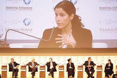 بروفيسوره سعوديه